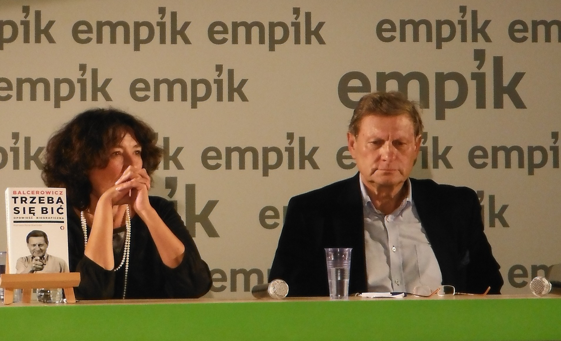 Marta Stremecka i Leszek Balcerowicz podczas promocji książki "Trzeba się bić".